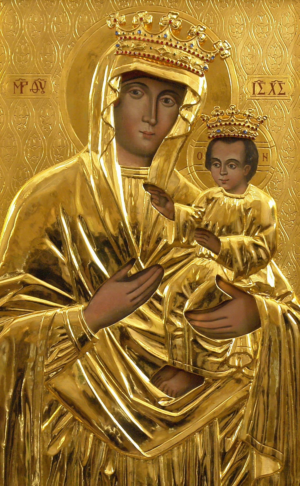 Тучнянська чудотворна ікона Пресвятої Богородиці, с.Тучне Перемишлянського району